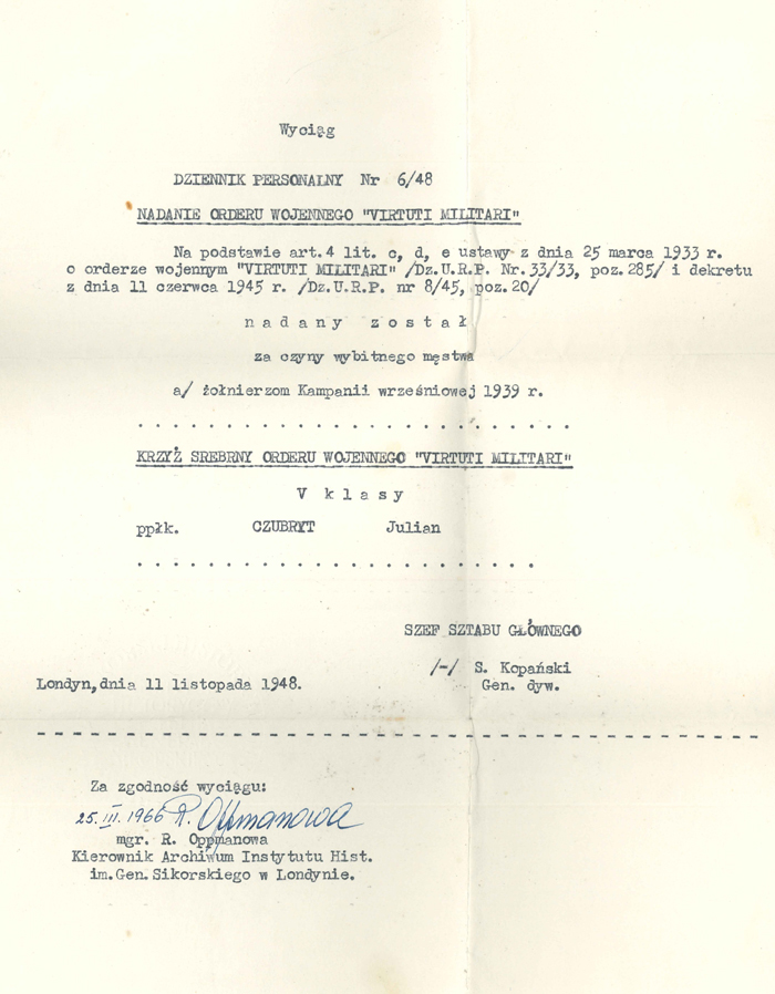 Rozkaz NW o nadaniu VM